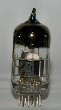 6N14P vacuum tube, USSR (Reflektor) 1965